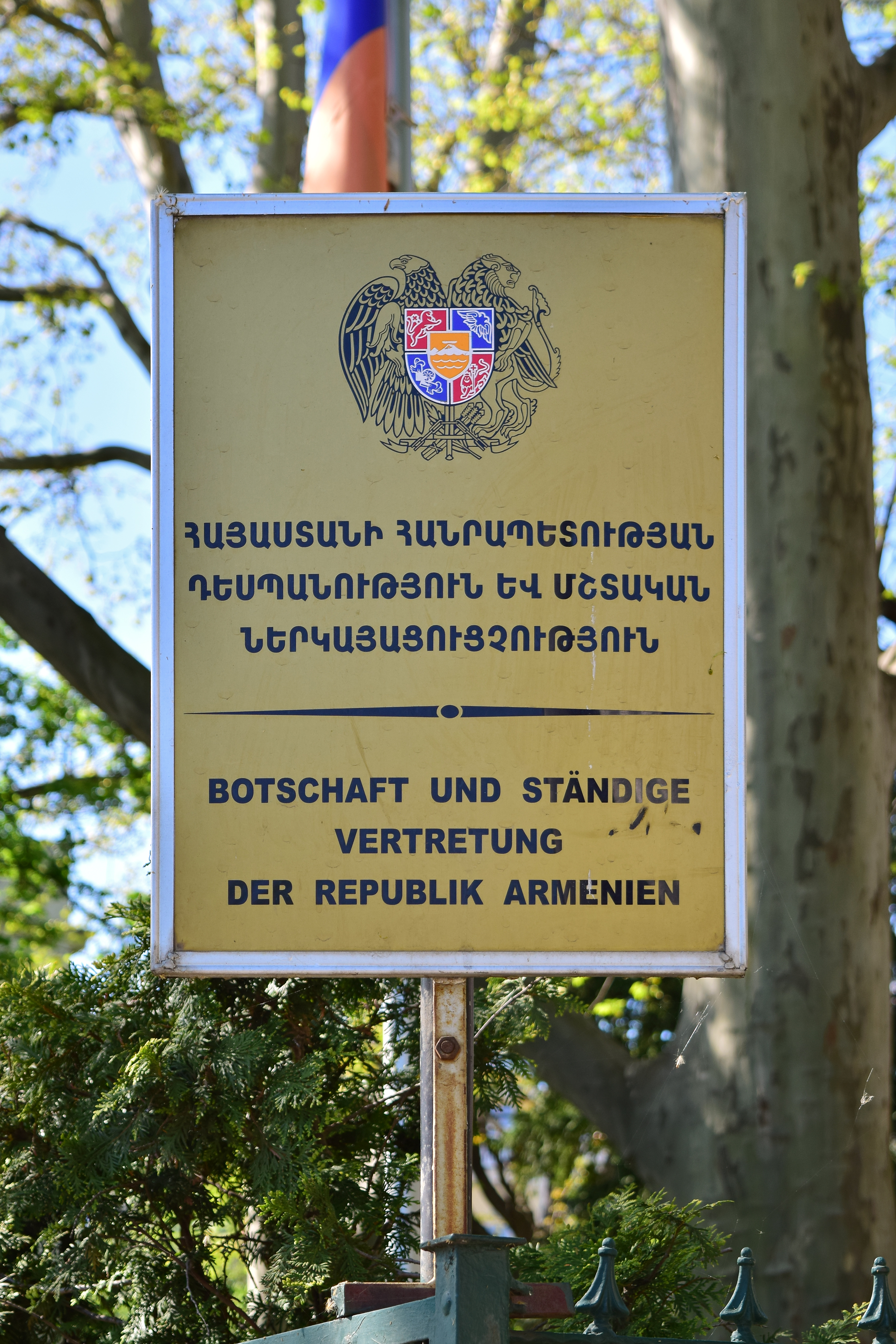 Armenische Botschaft in 1140 Wien, Hadikgasse 28